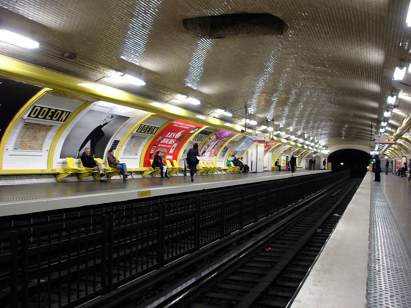 Station Odéon, de la ligne 4 du métro de Paris, France.